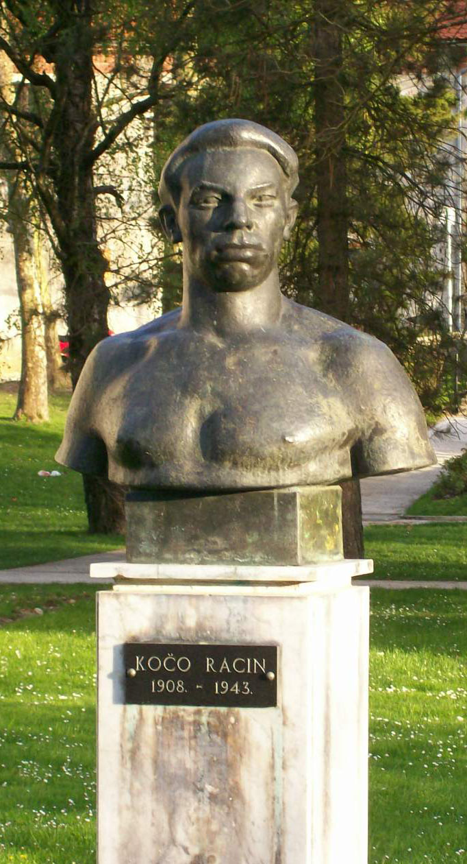 Spomenik Koči Racinu u Samoboru